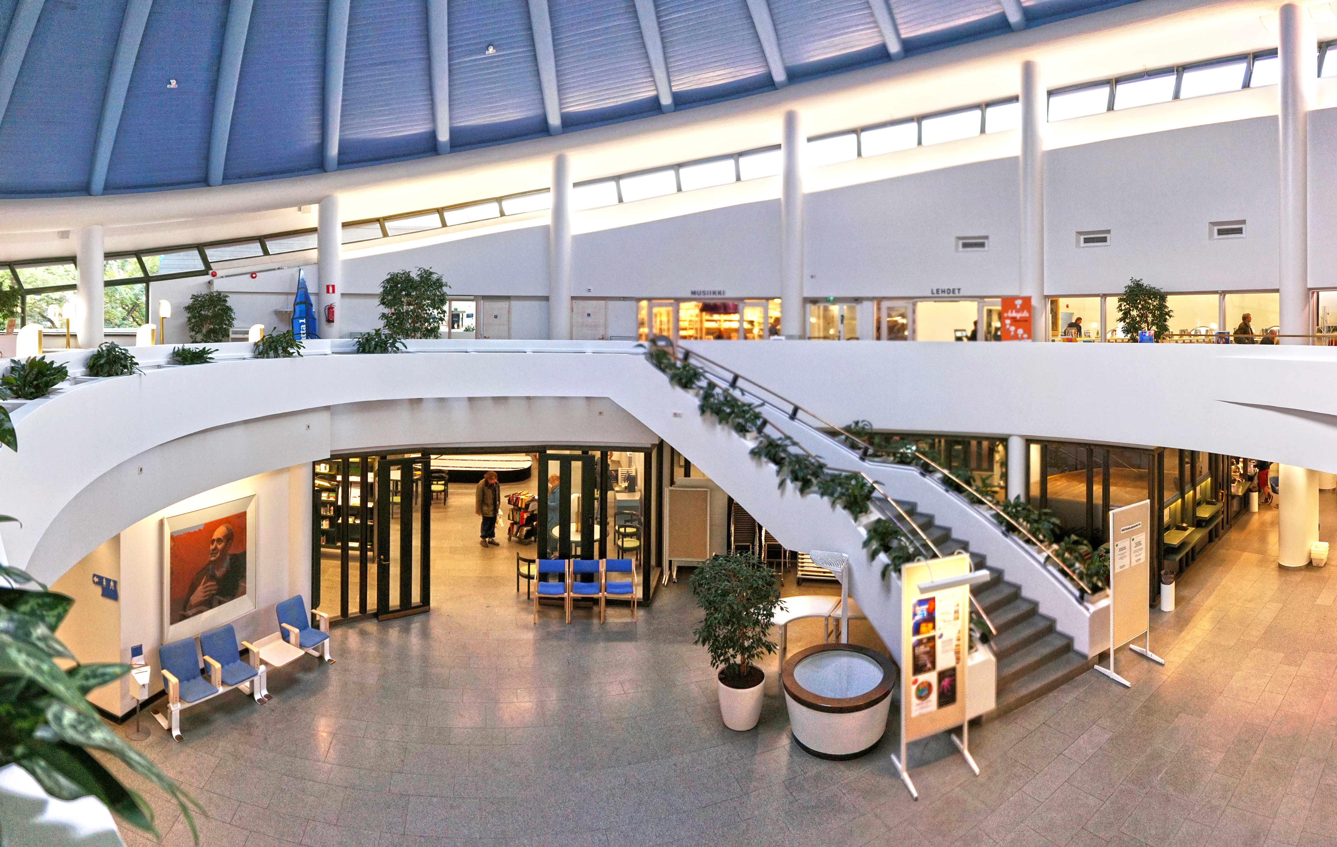 Tampereen kaupungin pääkirjasto. This is a photo of a monument in Finland identified by the ID 'Main Library of Tampere City Library' (Q11896298)